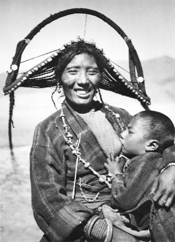 Tibetexpedition, Tibeterin in Tracht mit Kind Lager Gayokang, Tibeterin mit Sohn [Kopfschmuck]